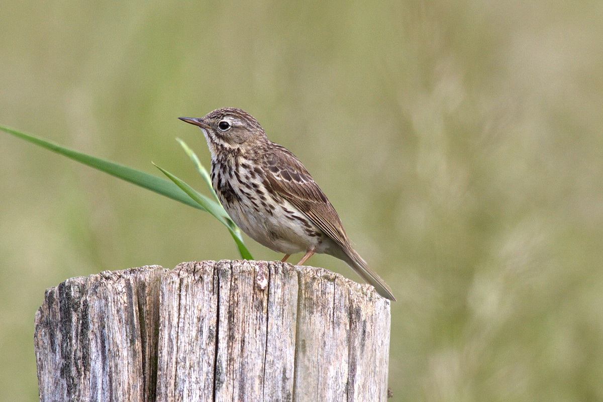 Brutvogel Wiesenpieper auf Zaunpfahl im Naturschutzgebiet Bislicher Insel in NRW, Deutschland